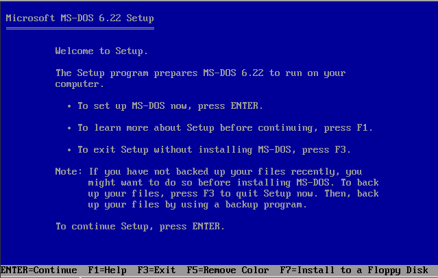 Pierwsze okno instalacyjne MS-DOS